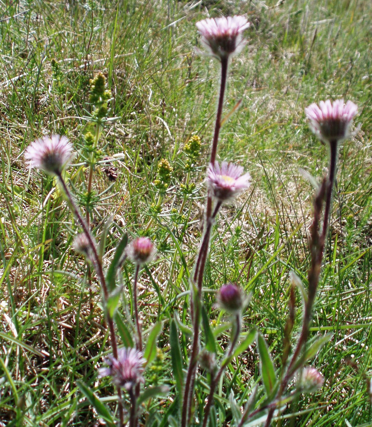 Erigeron borealis (Nordisches Berufkraut) in Iceland